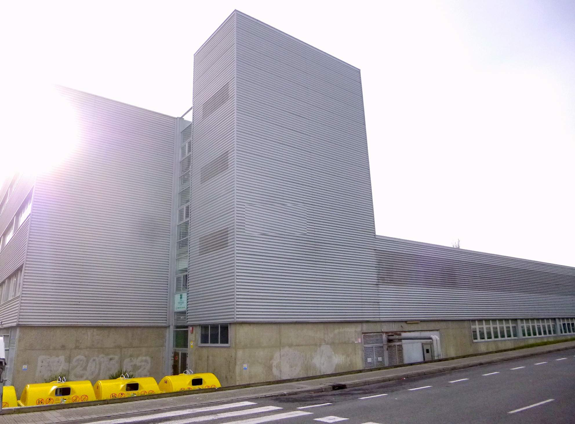 Lejona - Campus de Bizkaia de la UPV-EHU - Escuela de Hostelería